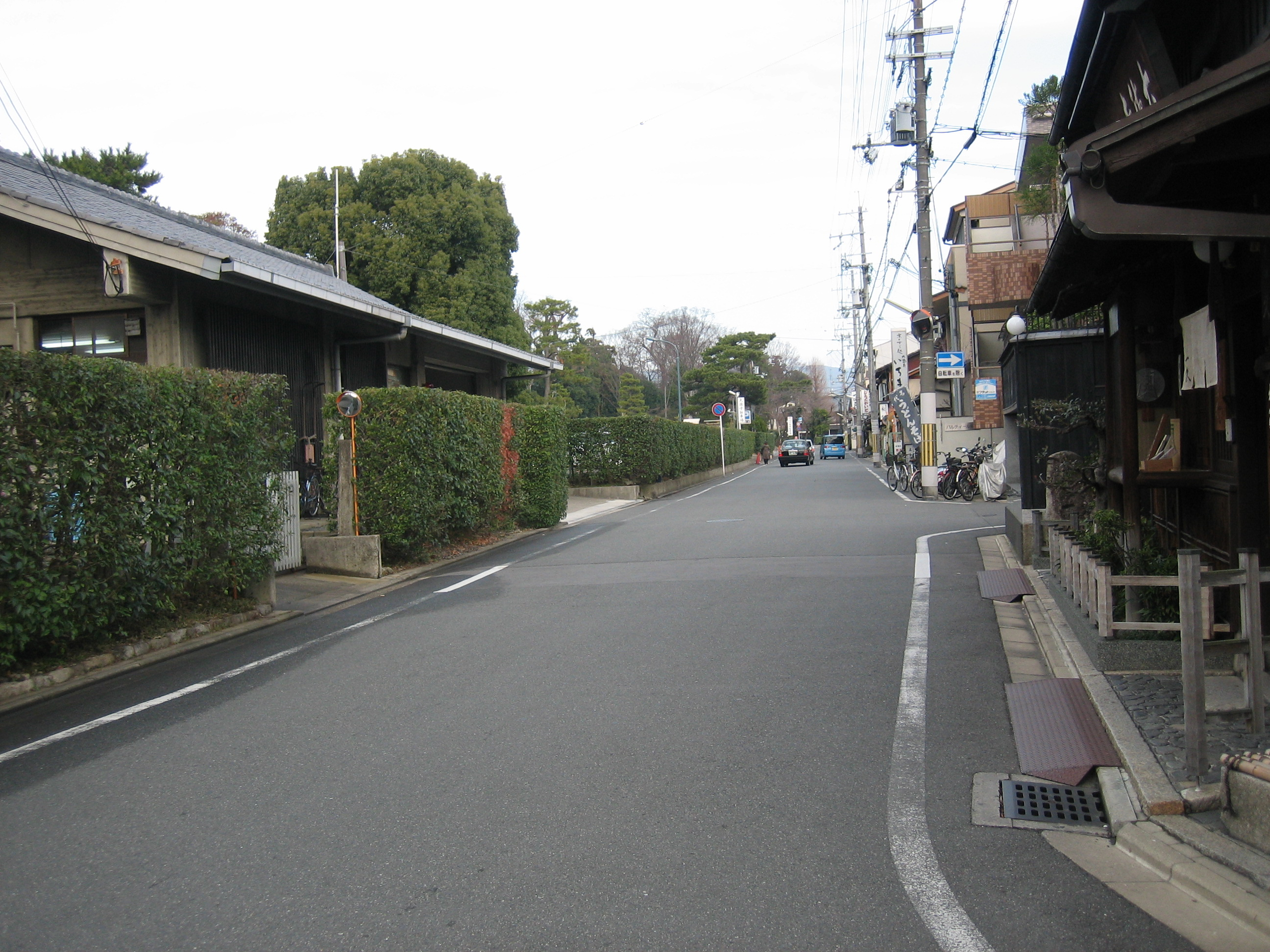 大徳寺通を京都市北区紫野雲林院町で撮影